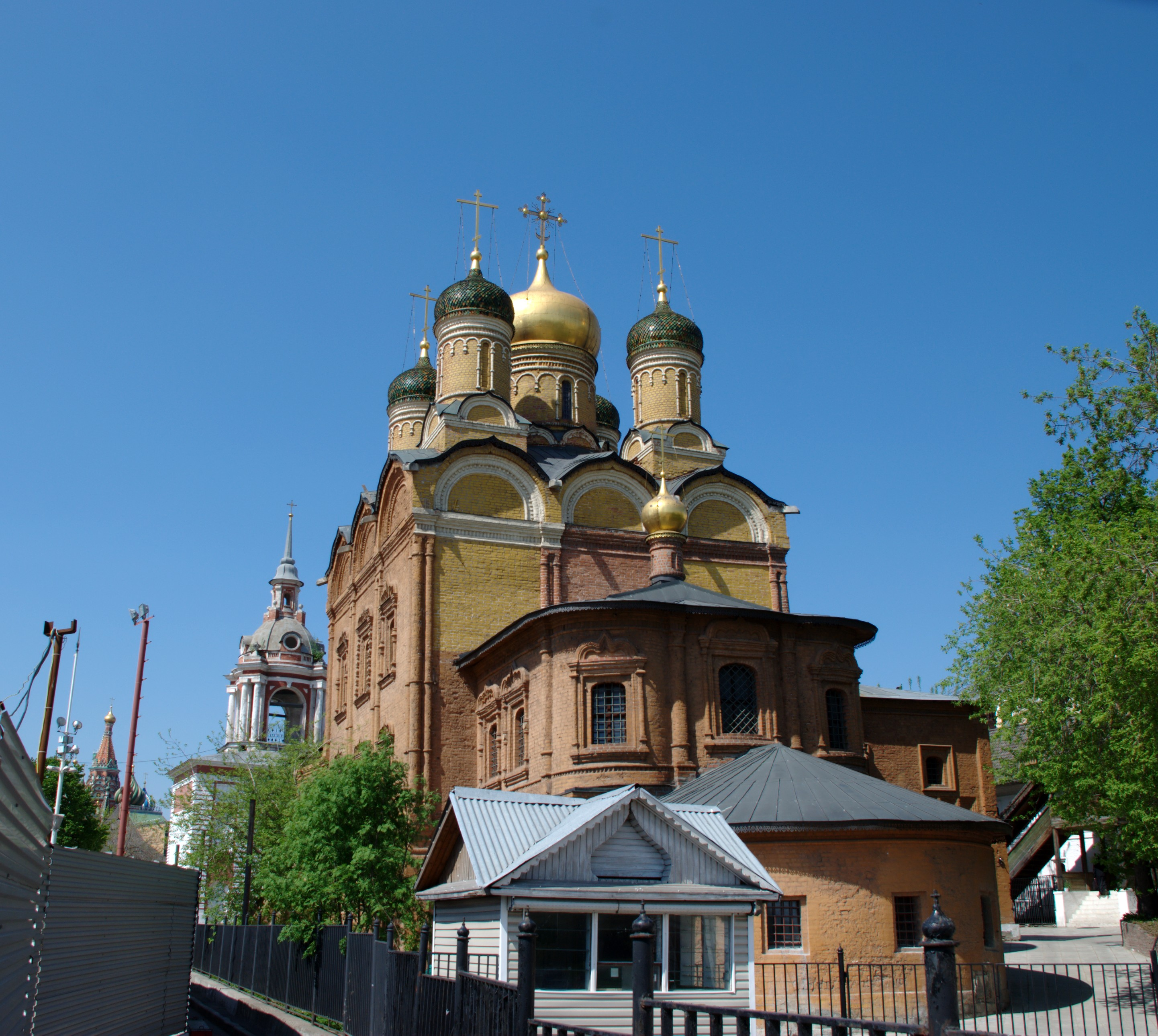 Собор Иконы Божией Матери «Знамение». 1679 - 84г.г. Часть бывшего Знаменского монастыря